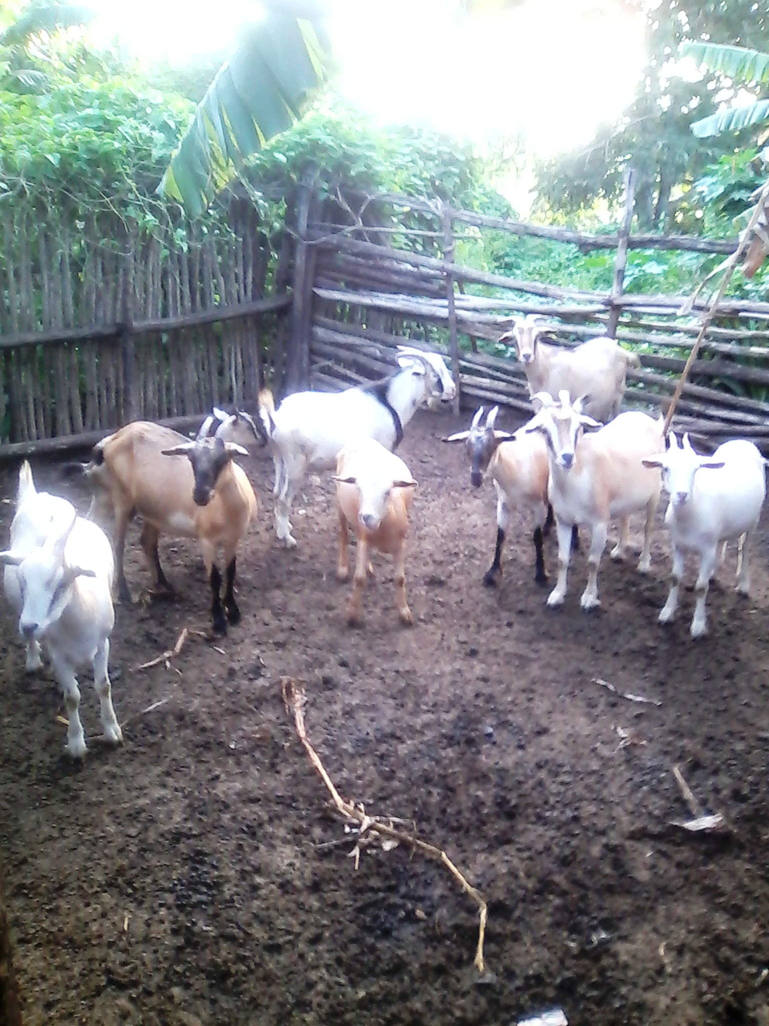 Ganderia familiar caprina de Alegria de Pío